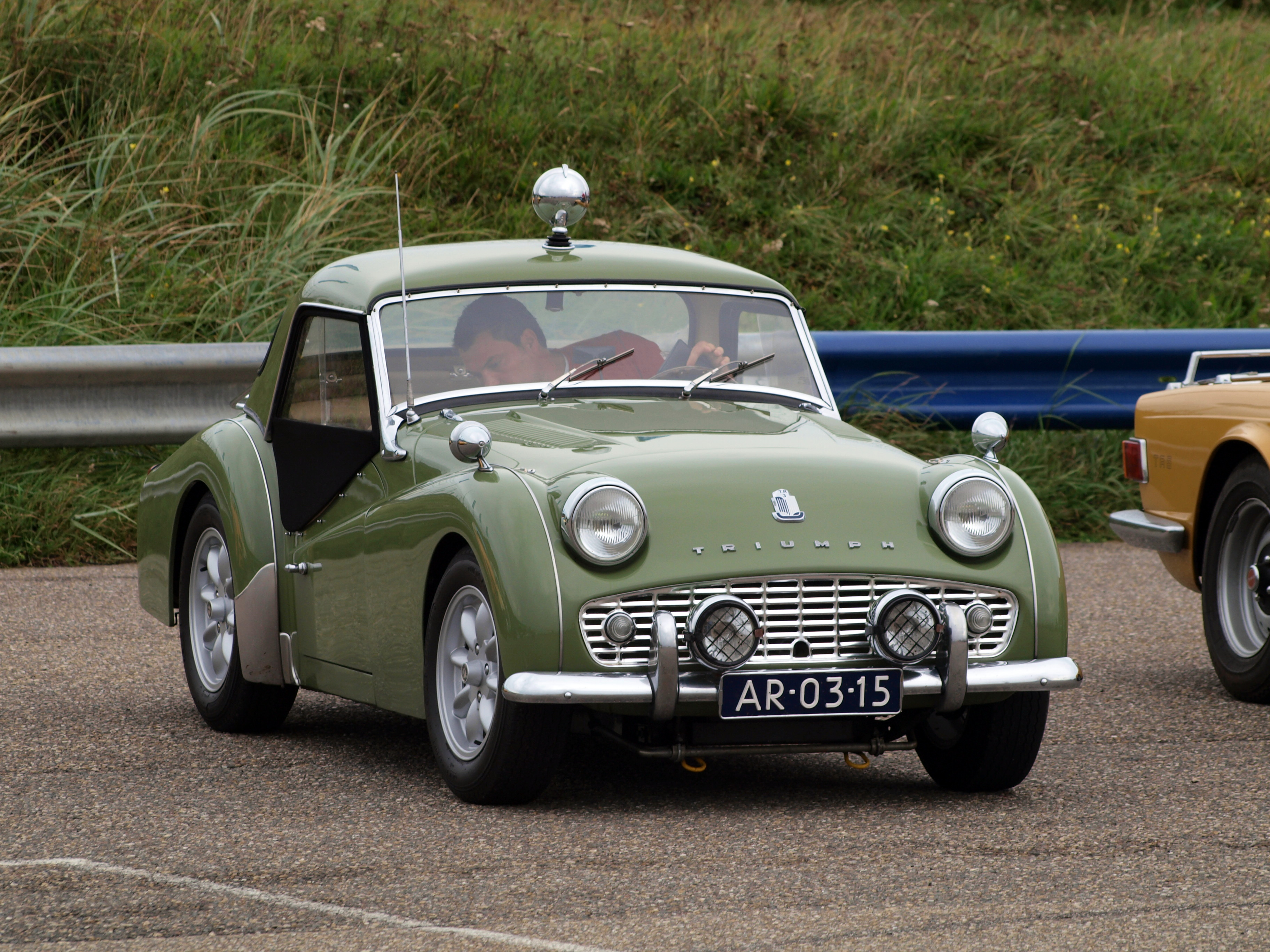 Nationaal Oldtimer Festival Zandvoort 2011.